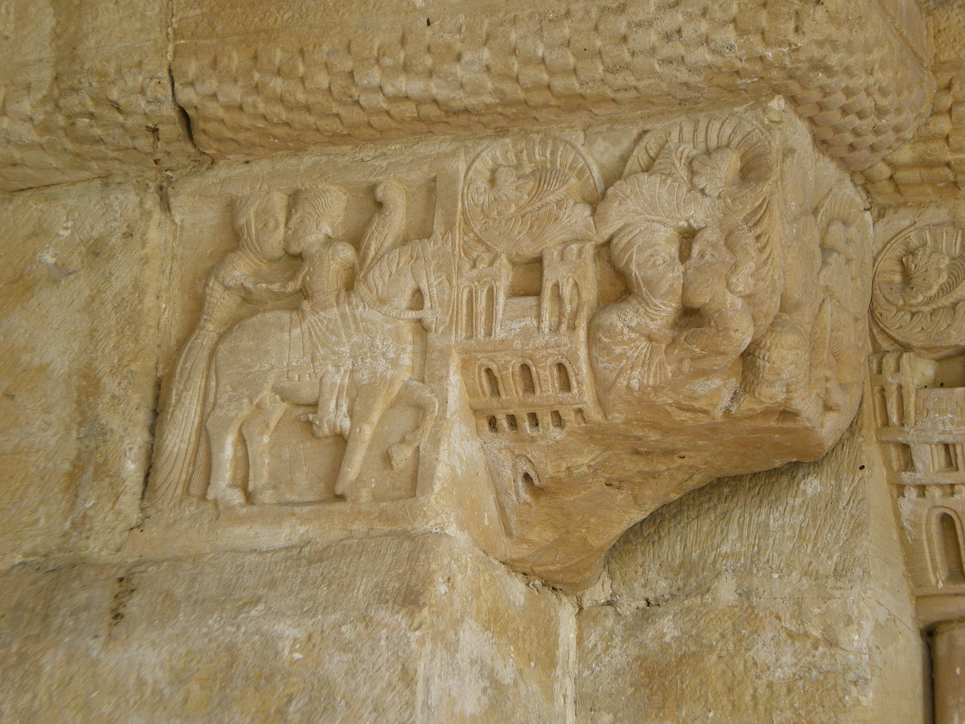 Monasterio de San Pedro de Villanueva (s.XII) - Portada - Detalle: historia del rey Fávila; de izquierda a derecha partida para la jornada de caza, despedida de su esposa Froiluba a la puerta de palacio y la lucha con el oso.